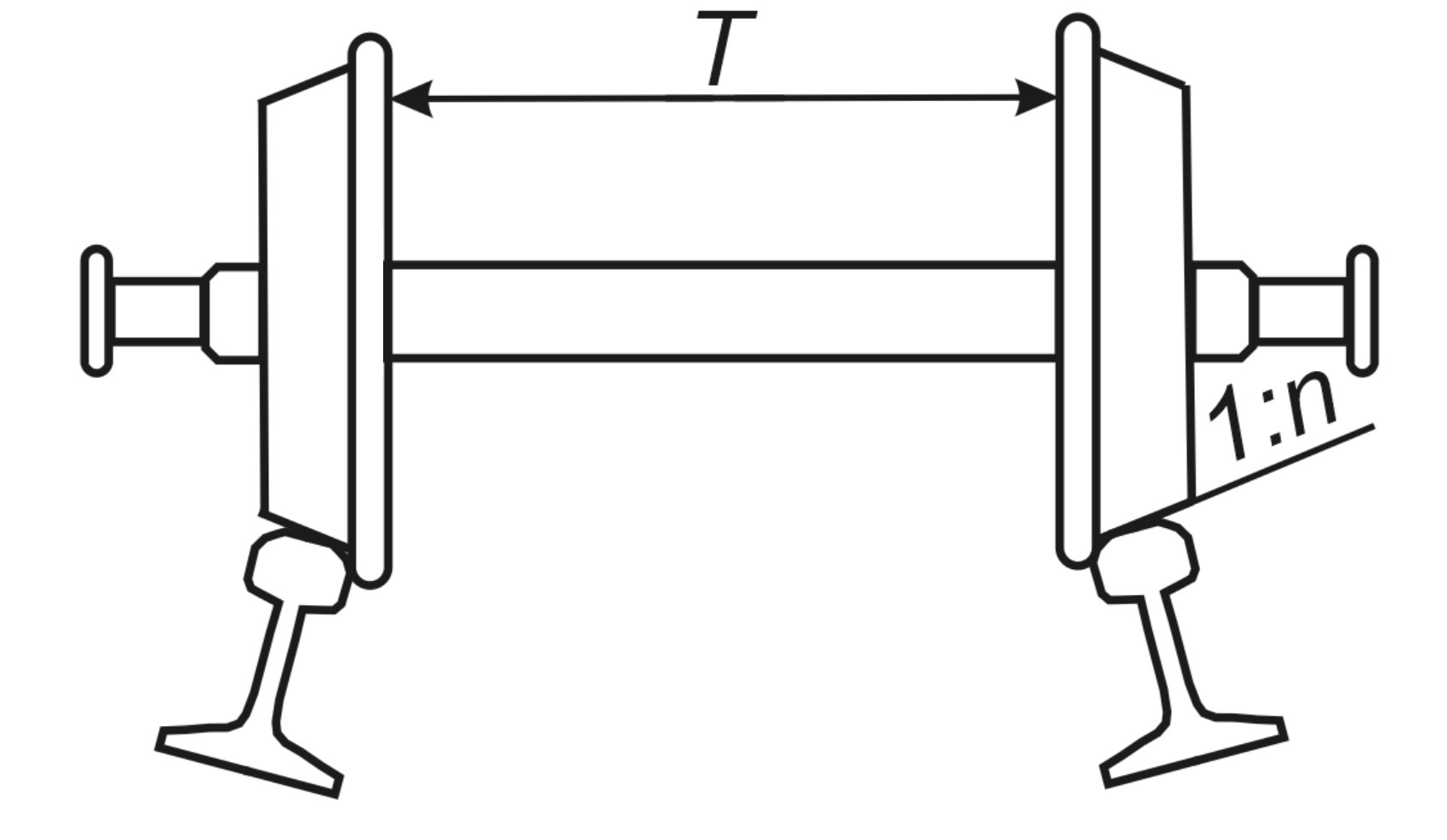 Ekipāžas riteņpāris